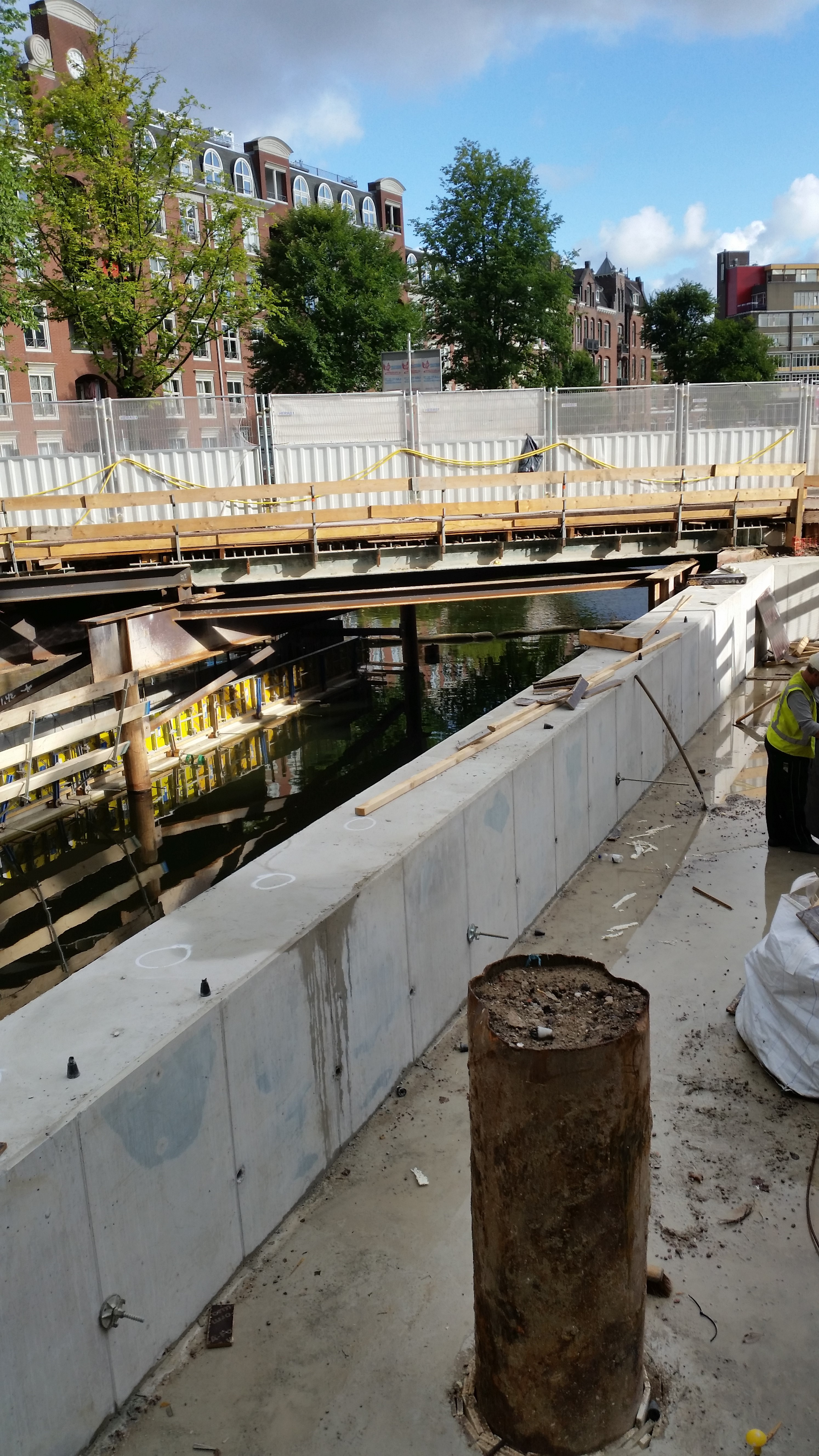 Werkzaamheden aan Brug 108 (in Amsterdam)